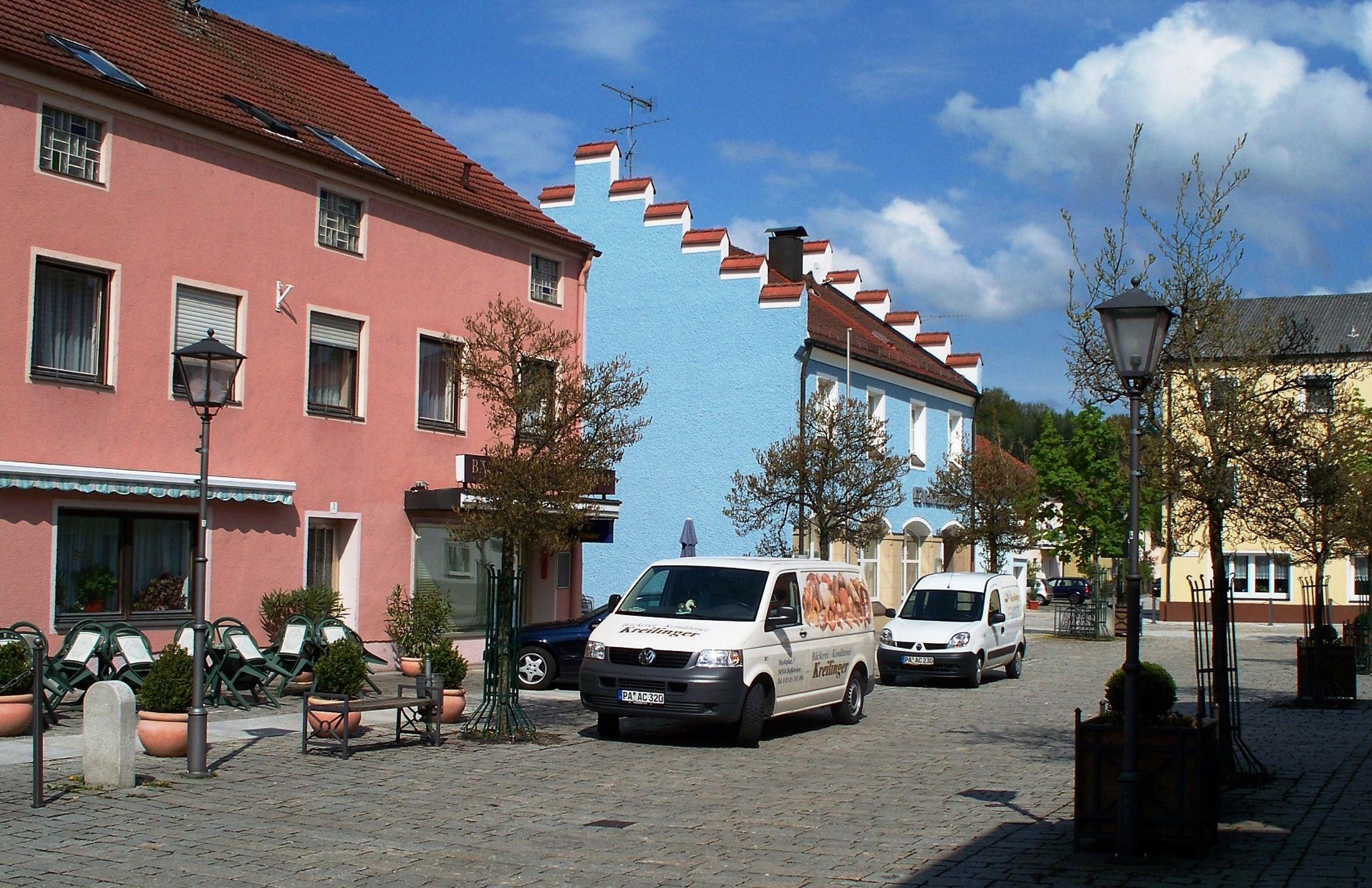 Marktplatz (Straße) in Hofkirchen, Landkreis Passau, Bayern.